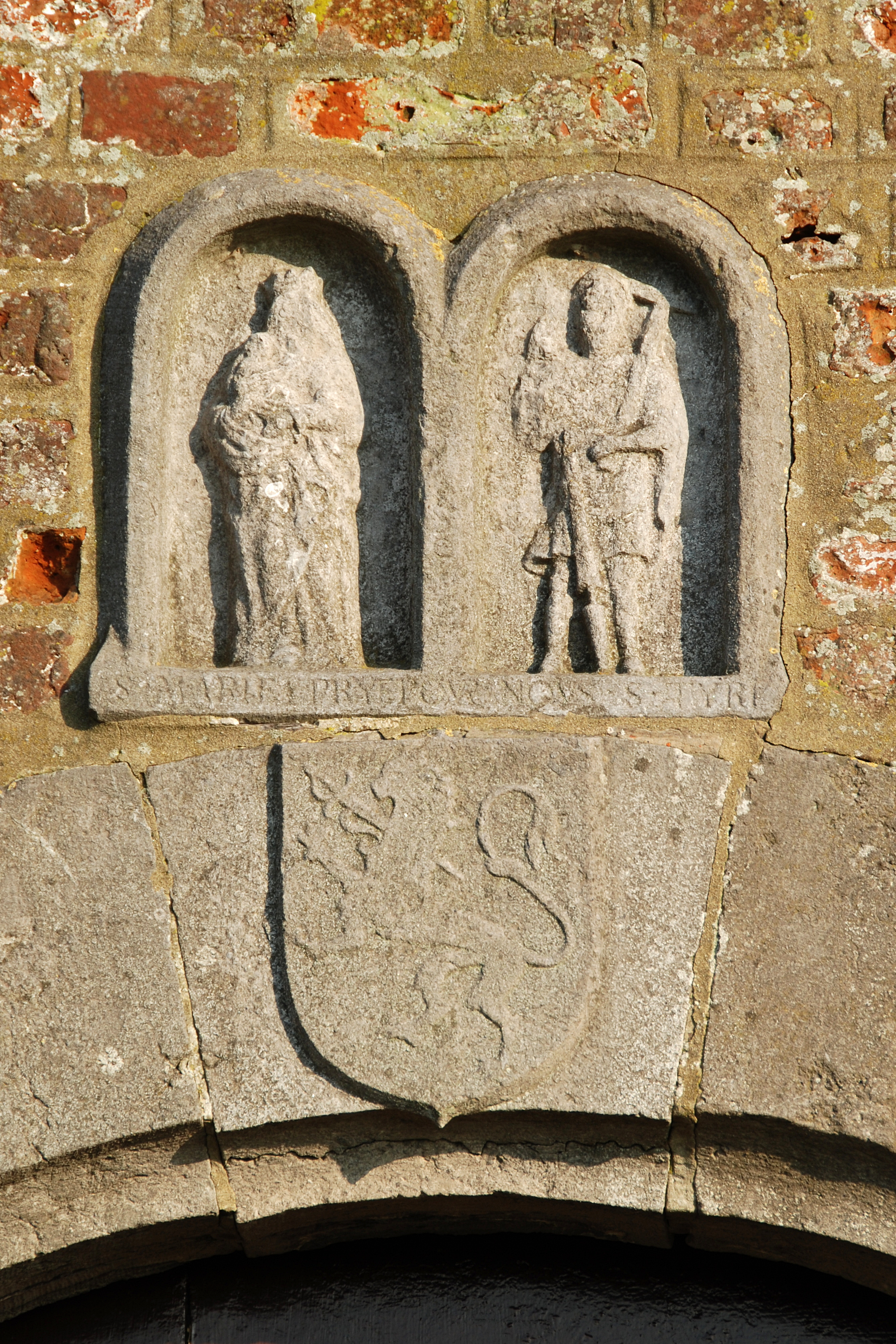 Belgique - Bousval -Chapelle du Try-au-Chêne